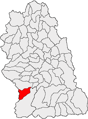 Categorie:Hărţi ale judeţului Hunedoara